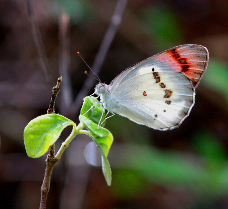 CRIMSON TIP male Colotis danae